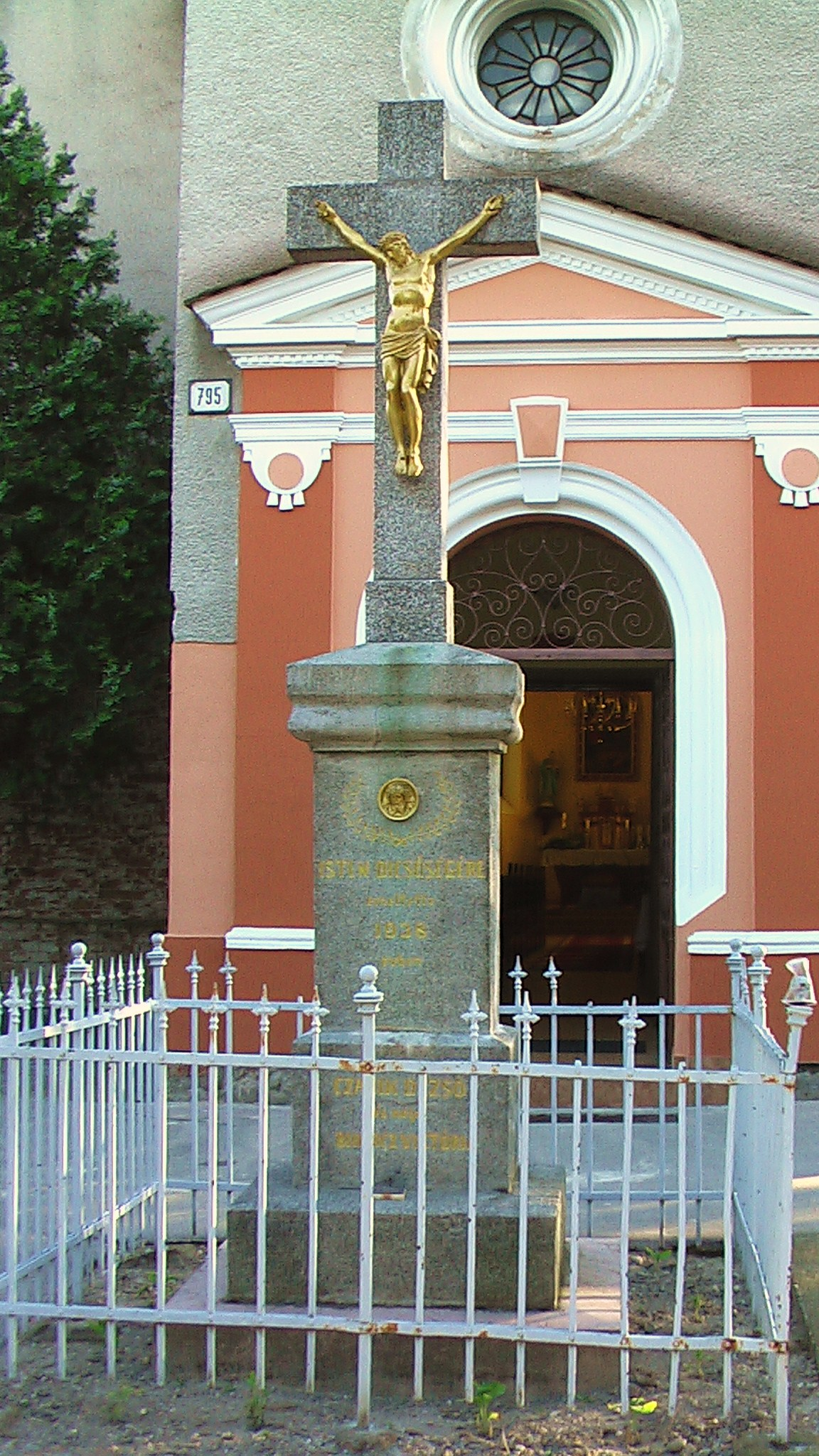 Dolné Saliby - kríž pred vstupom do rímskokatolíckeho kostola